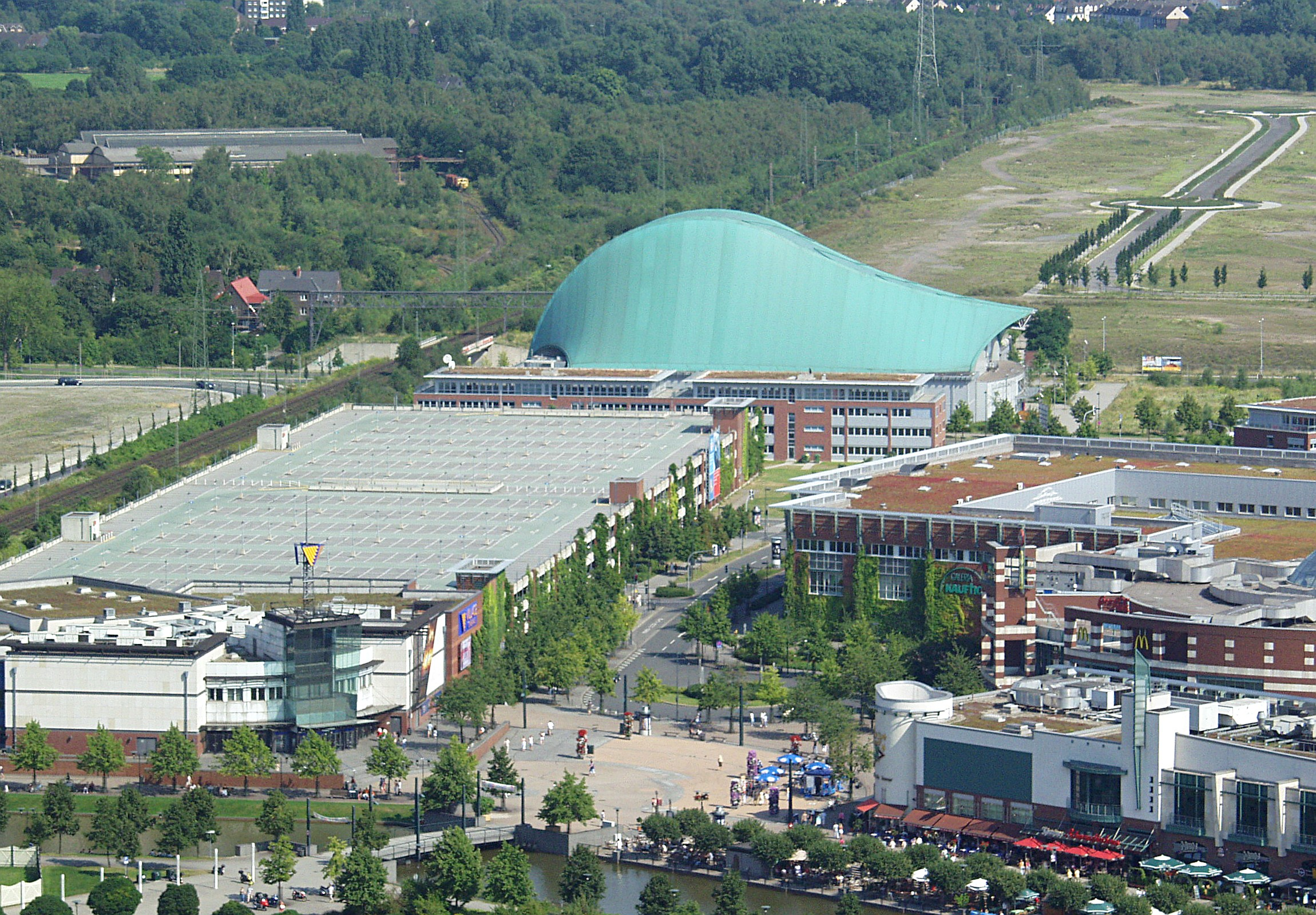 Kinos (links) und Metronom Theater (im Hintergrund mit dem grünen Dach) im CentrO-Komplex, Oberhausen